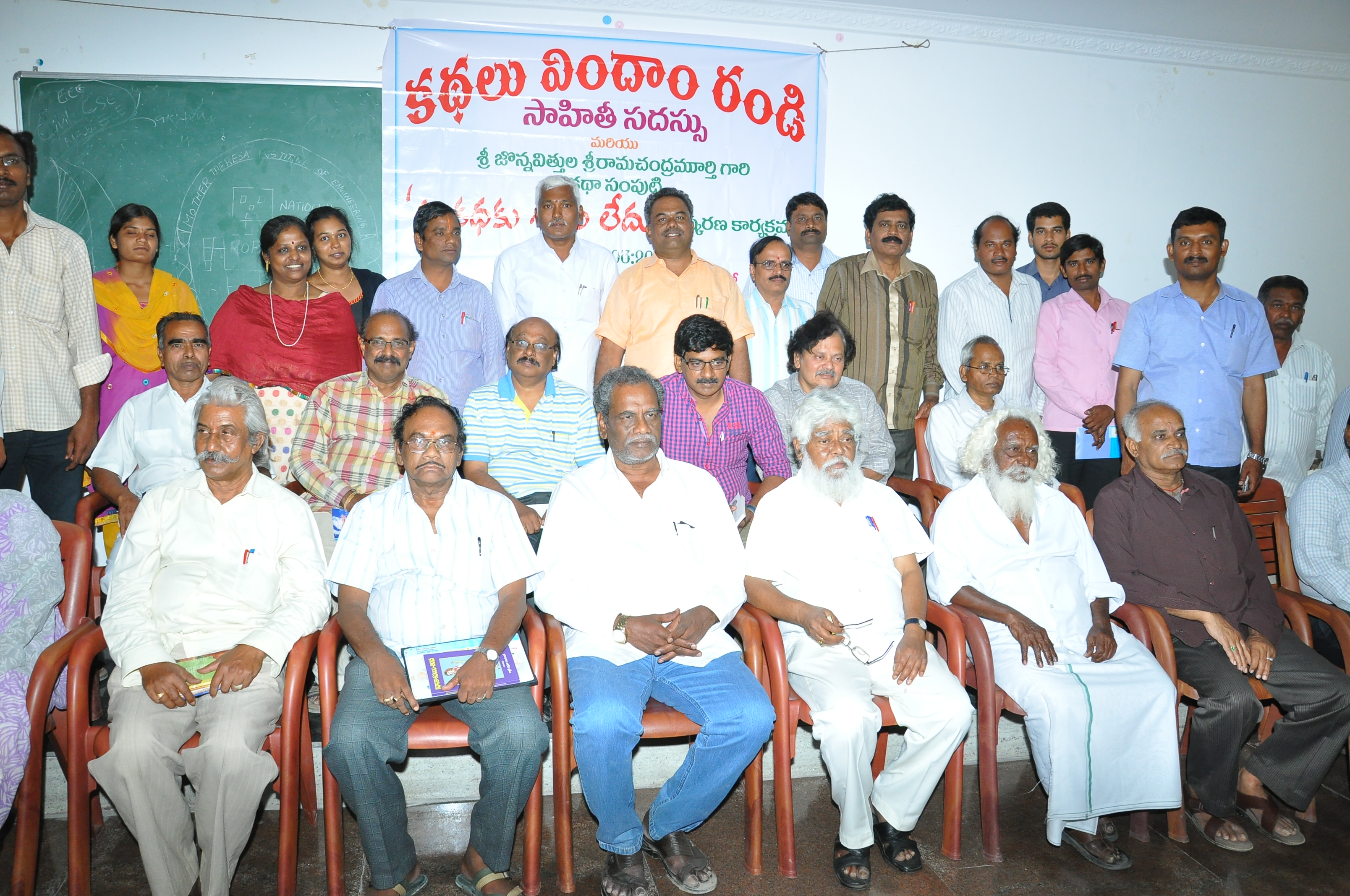 ఈ కథకు శిల్పం లేదు - పుస్తకావిష్కరణ సభ